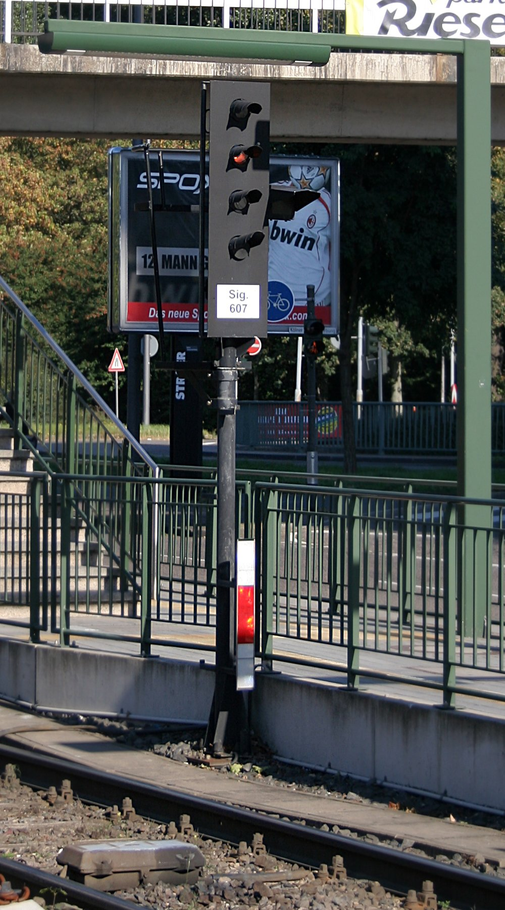 Signal der Kölner Stadtbahn mit Fahrsperre